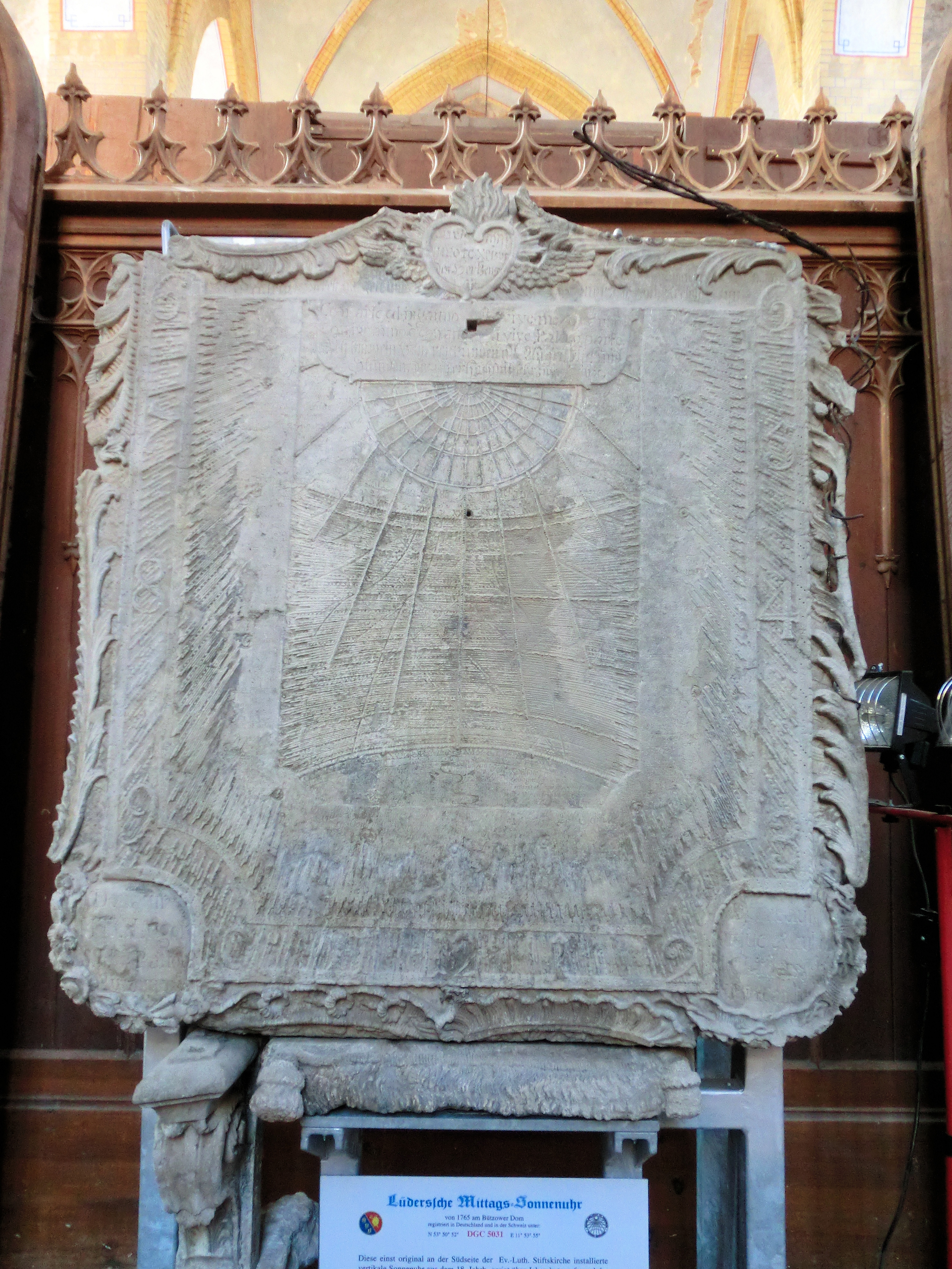 Bützow Stiftskirche Mittagssonnenuhr